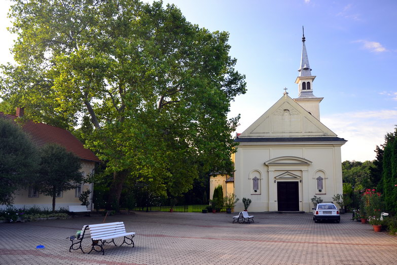 Lengyeltóti - Római katolikus templom